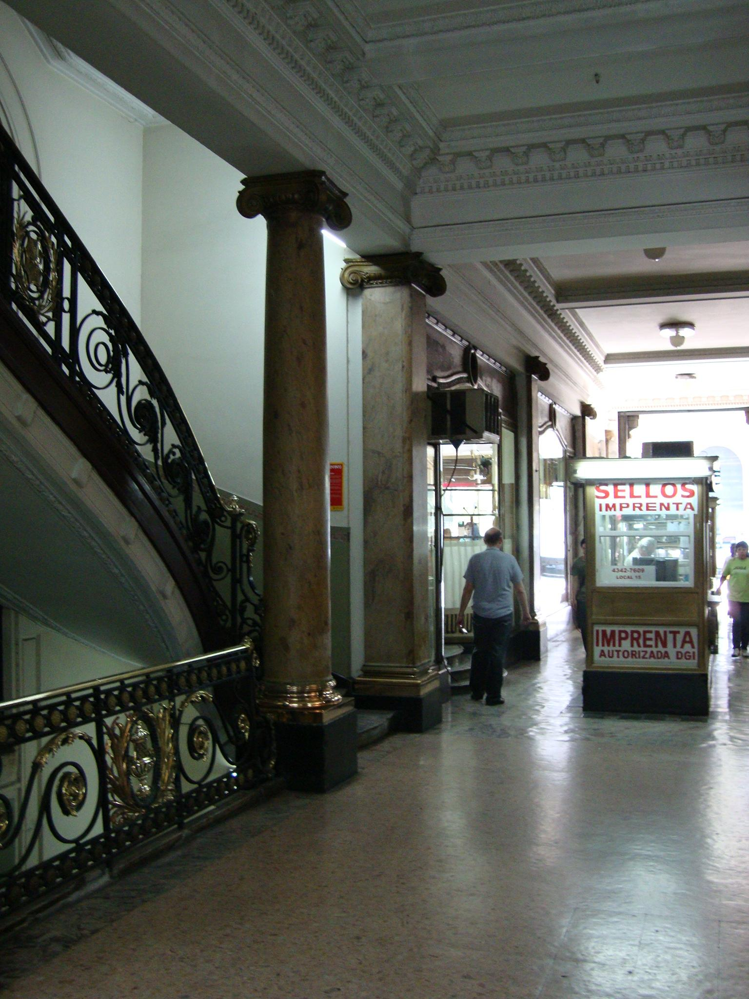 Interior del Pasaje Roverano, en Avenida de Mayo nº 560.